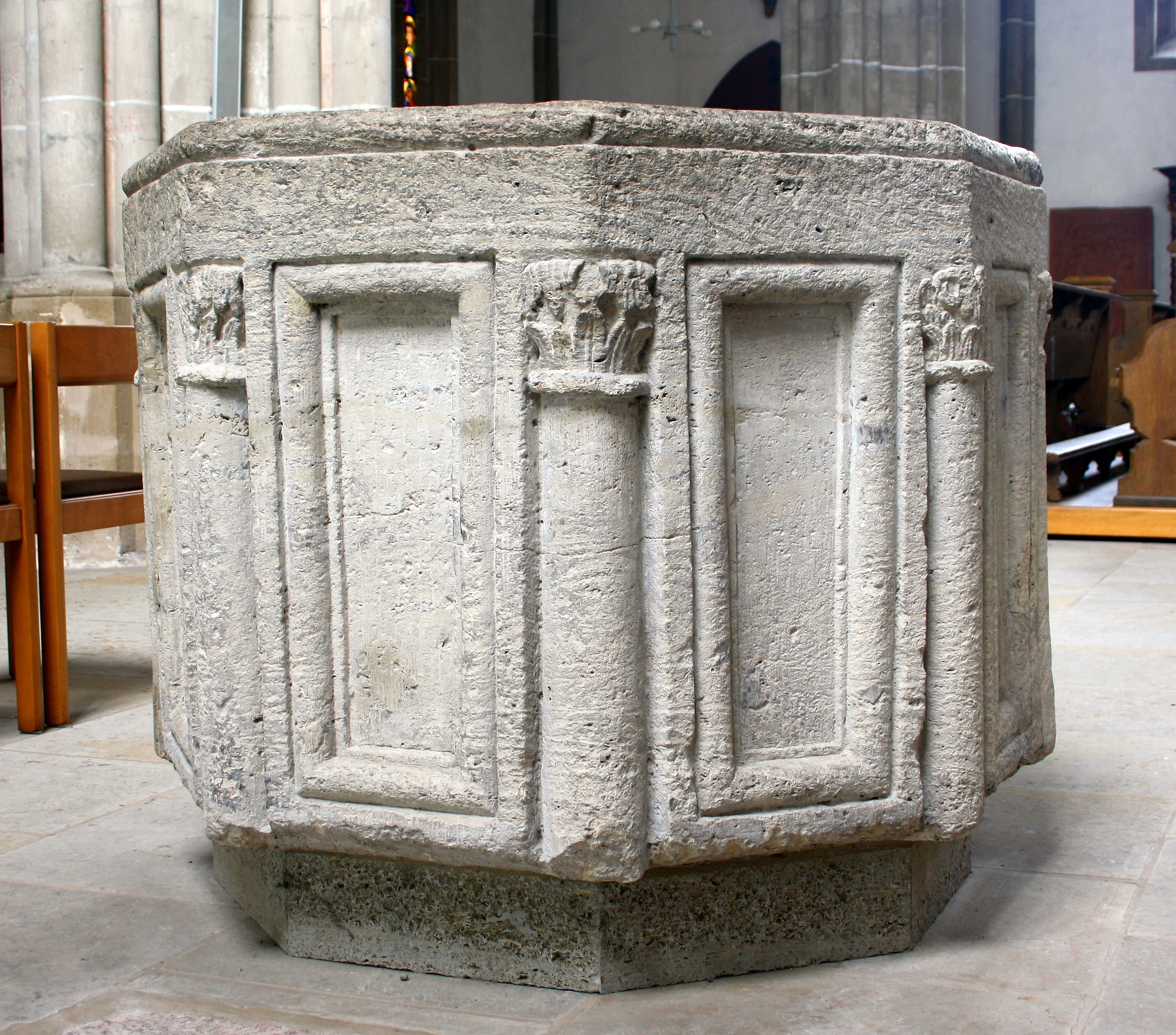 Mittelalterlicher Taufstein im Nordhäuser Dom. Er stammt aus dem Kloster Ilfeld. Höhe ohne Sockel 80 cm, Volumen ca. 260 Liter.